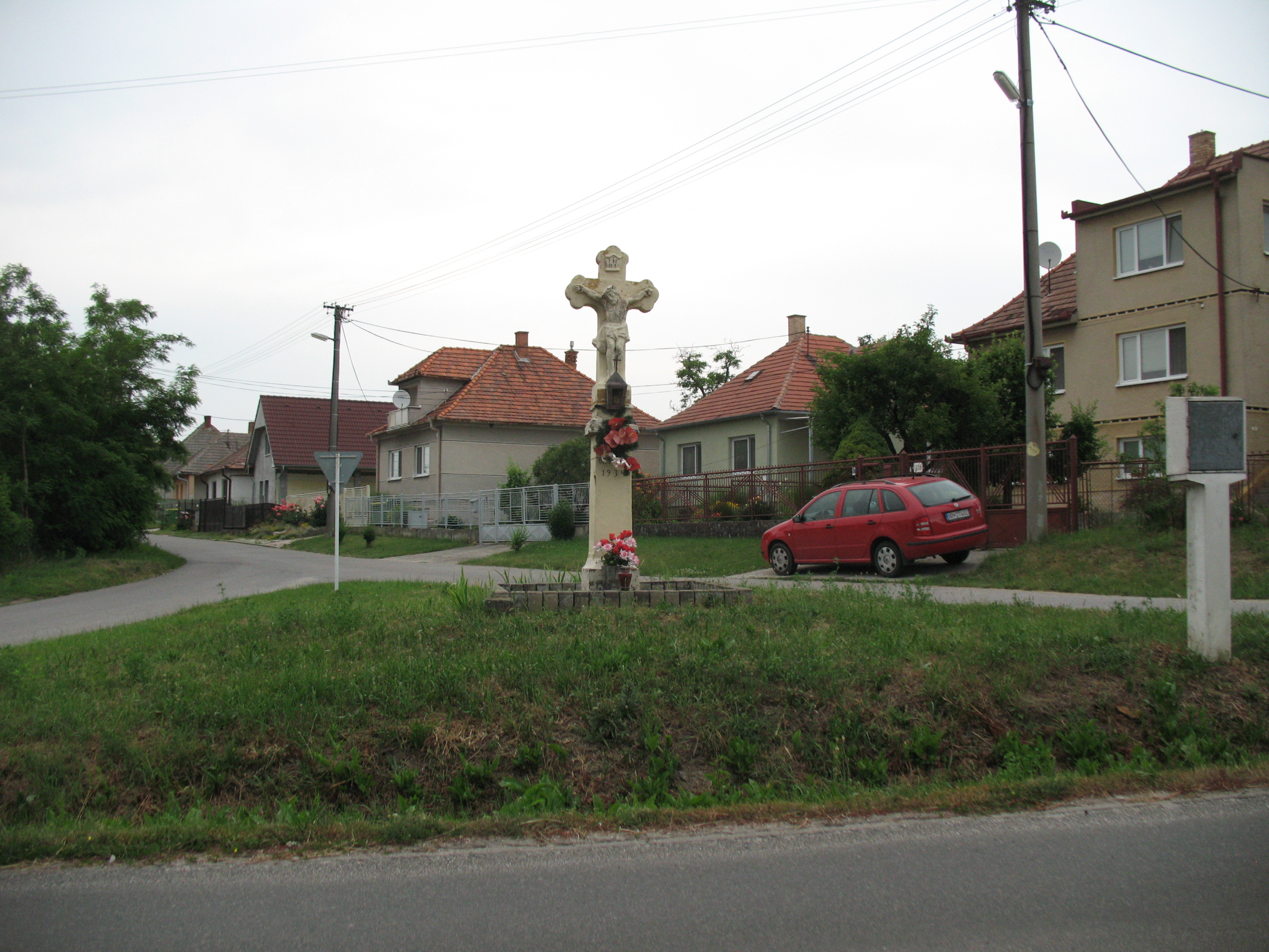 Nyitraújlak